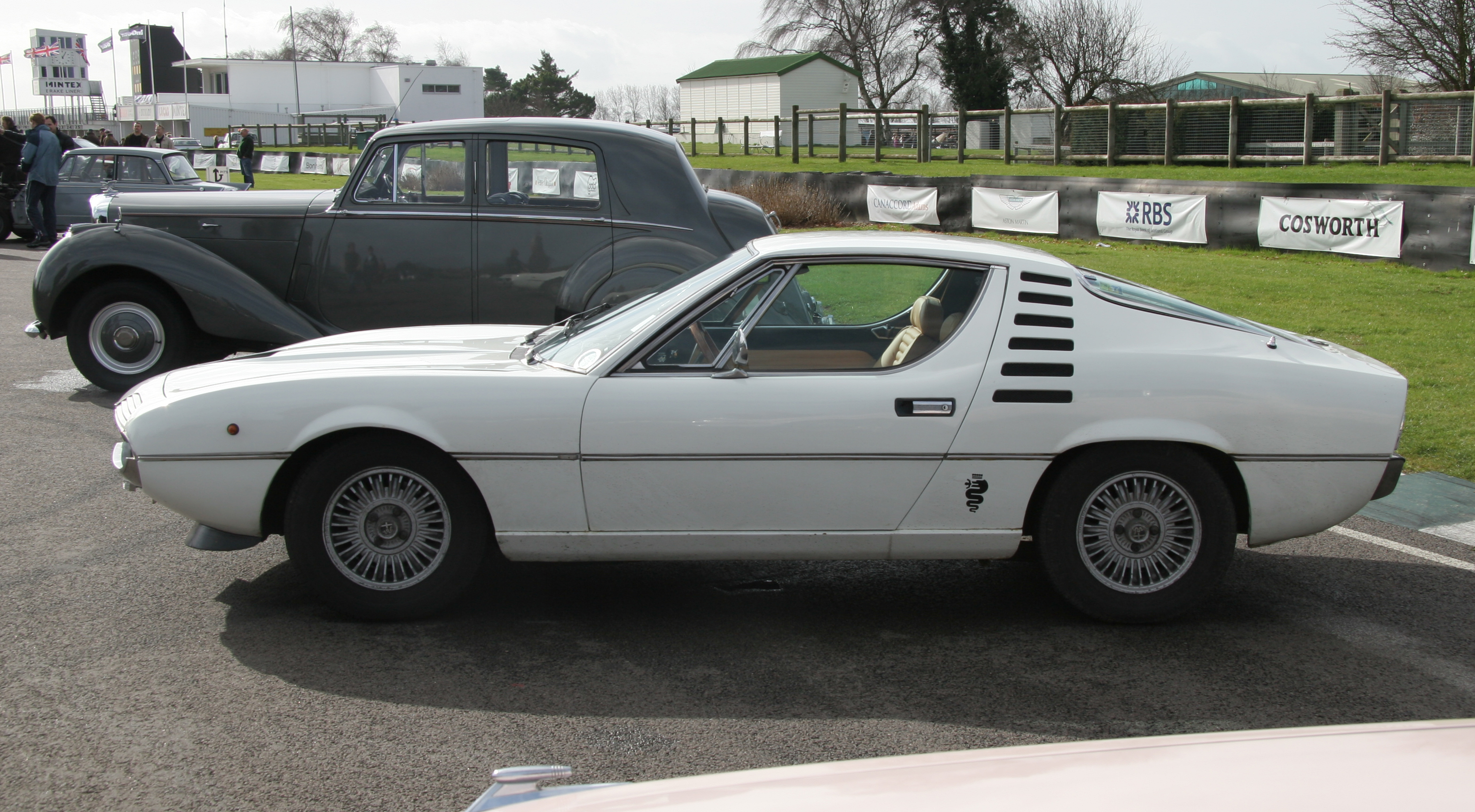 Alfa Romeo MontrealAlfa Romeo Montreal